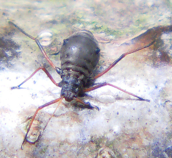 Eichenbaumlaus Eichen standen in der Nähe